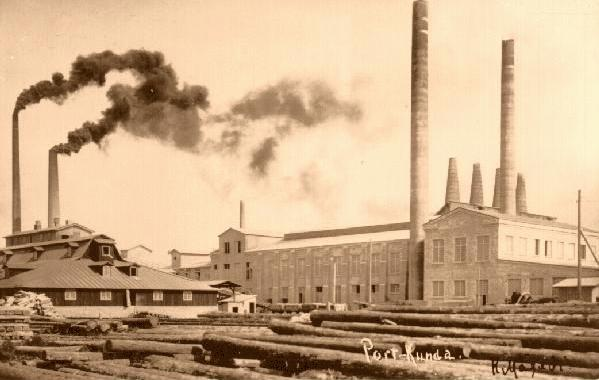 Kunda tsemendivabrik